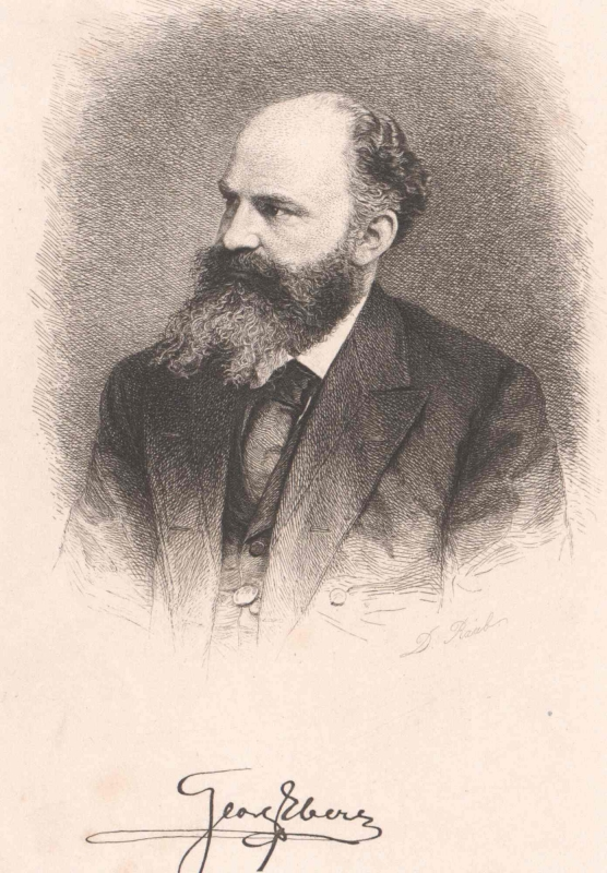 Georg Ebers Frontispiz aus der Gesamtausgabe der Romane und Novellen (Besitz: M. Olderdißen) Gemeinfrei, weil 19.Jh.